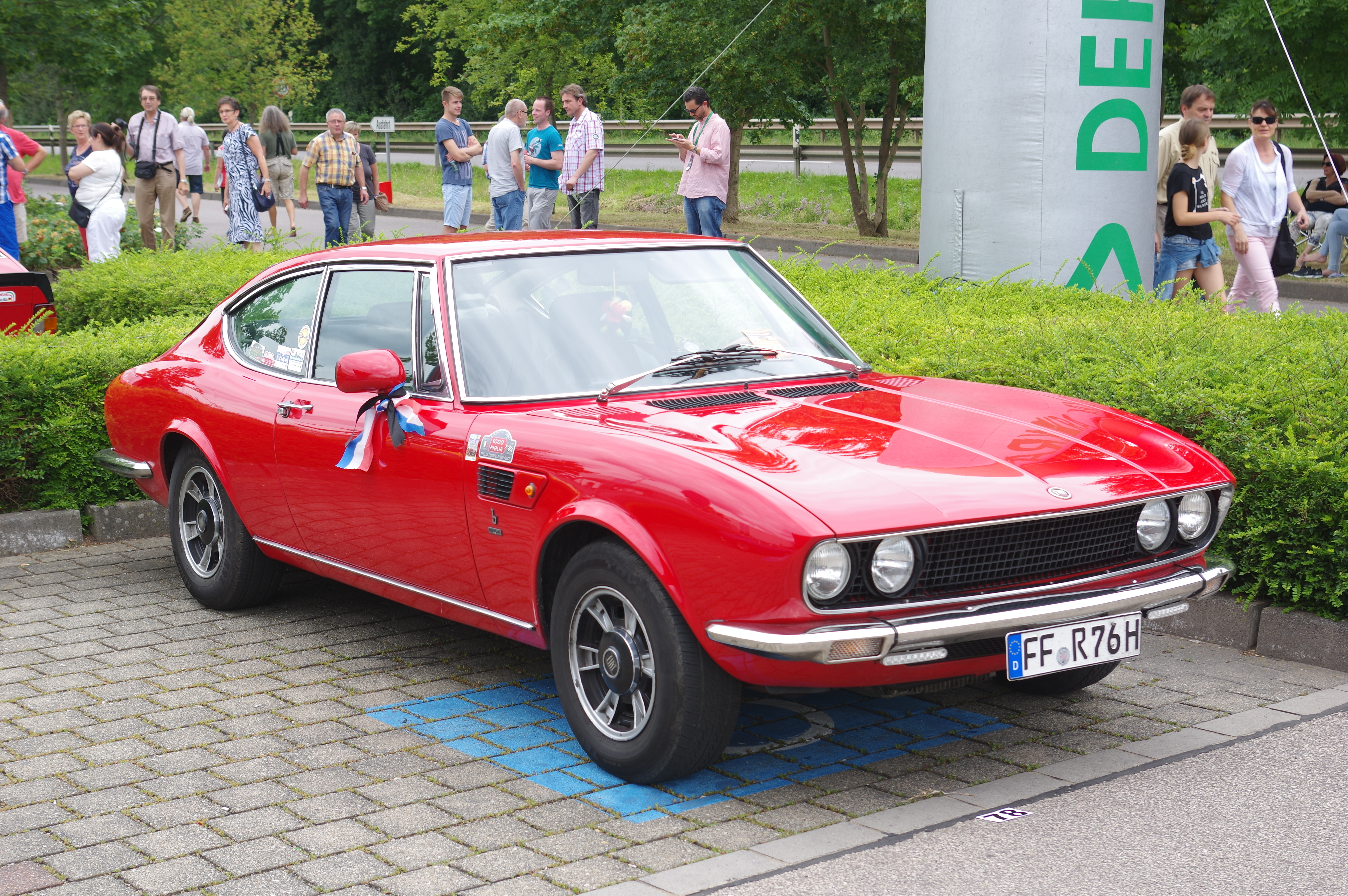 Fiat Dino Coupé 2400, Baujahr 1971. V6-Motor, 2418 cm³, 180 PS, 1320 kg, Höchstgeschwindigkeit 205 km/h. 32. Internationales Oldtimer Treffen Konz 2016, Das Nummernschild ist verfälscht!